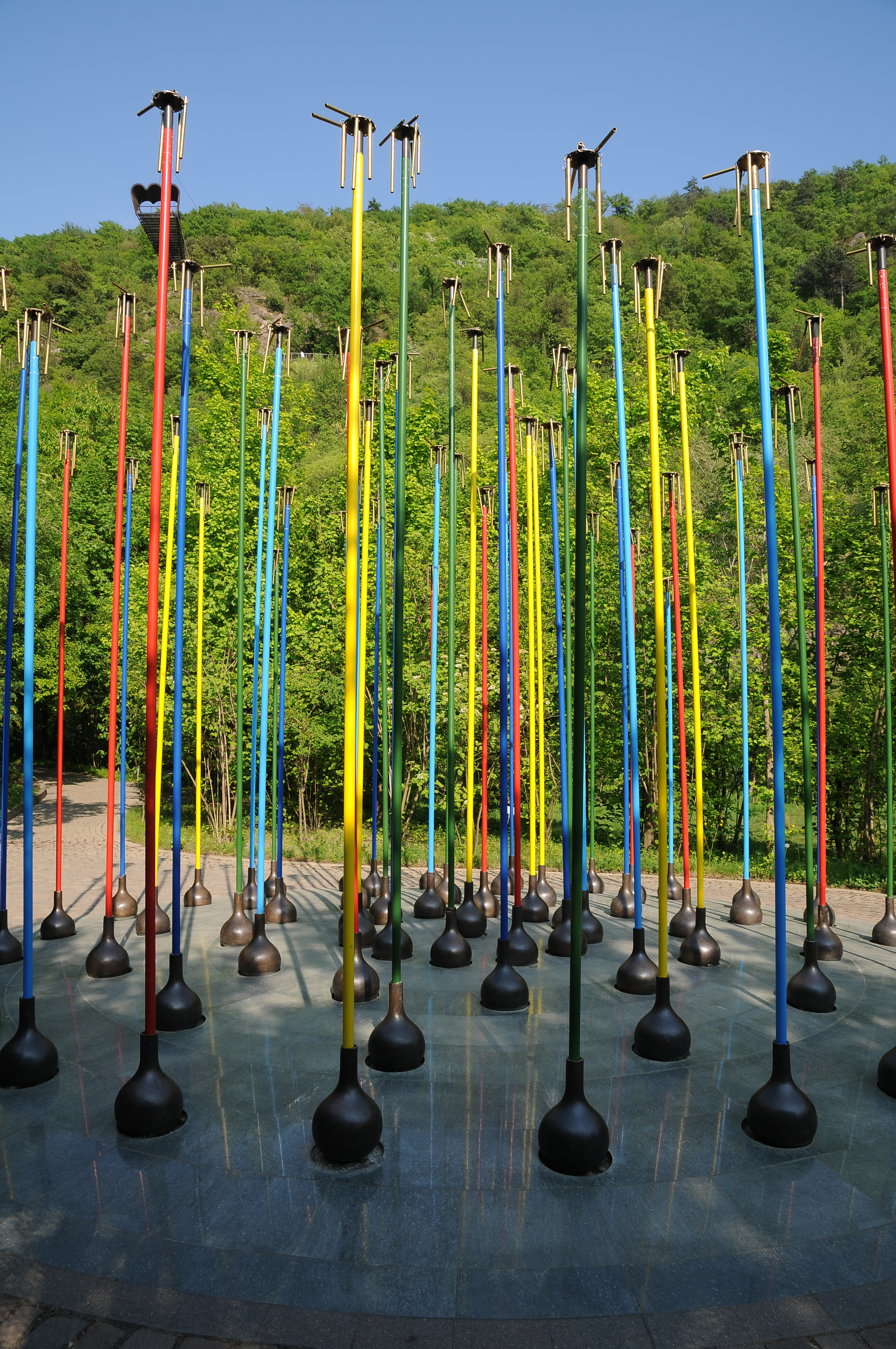 Die Gärten von Schloss Trauttmansdorff liegen am östlichen Stadtrand von Meran in Südtiro /Italien. Der nach seinem Wahrzeichen – Schloss Trauttmansdorff – benannte botanische Garten der Kurstadt Meran nimmt eine Fläche von rund zwölf Hektar ein.